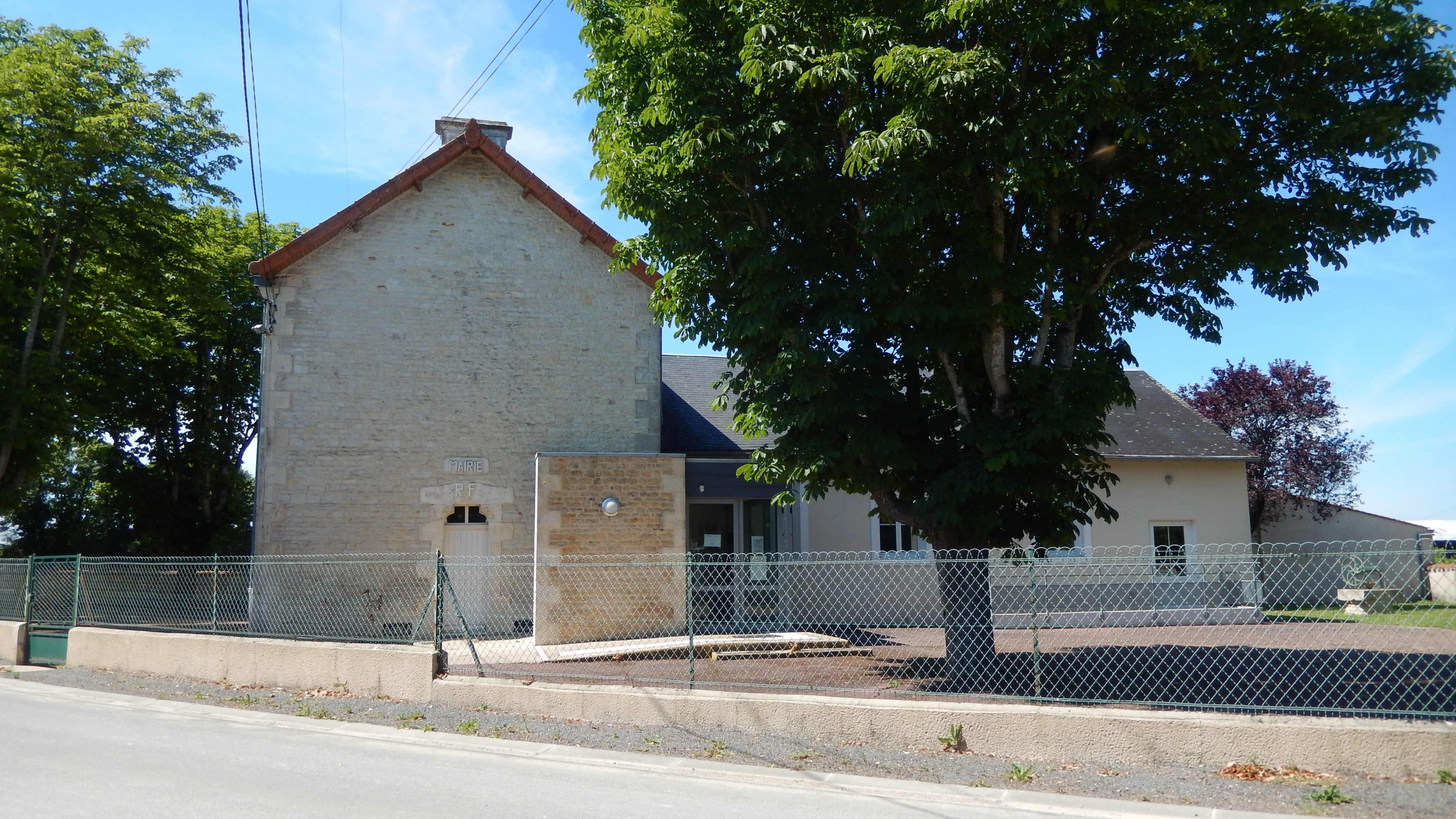 La mairie de la commune deux-sévrienne de Villemain.